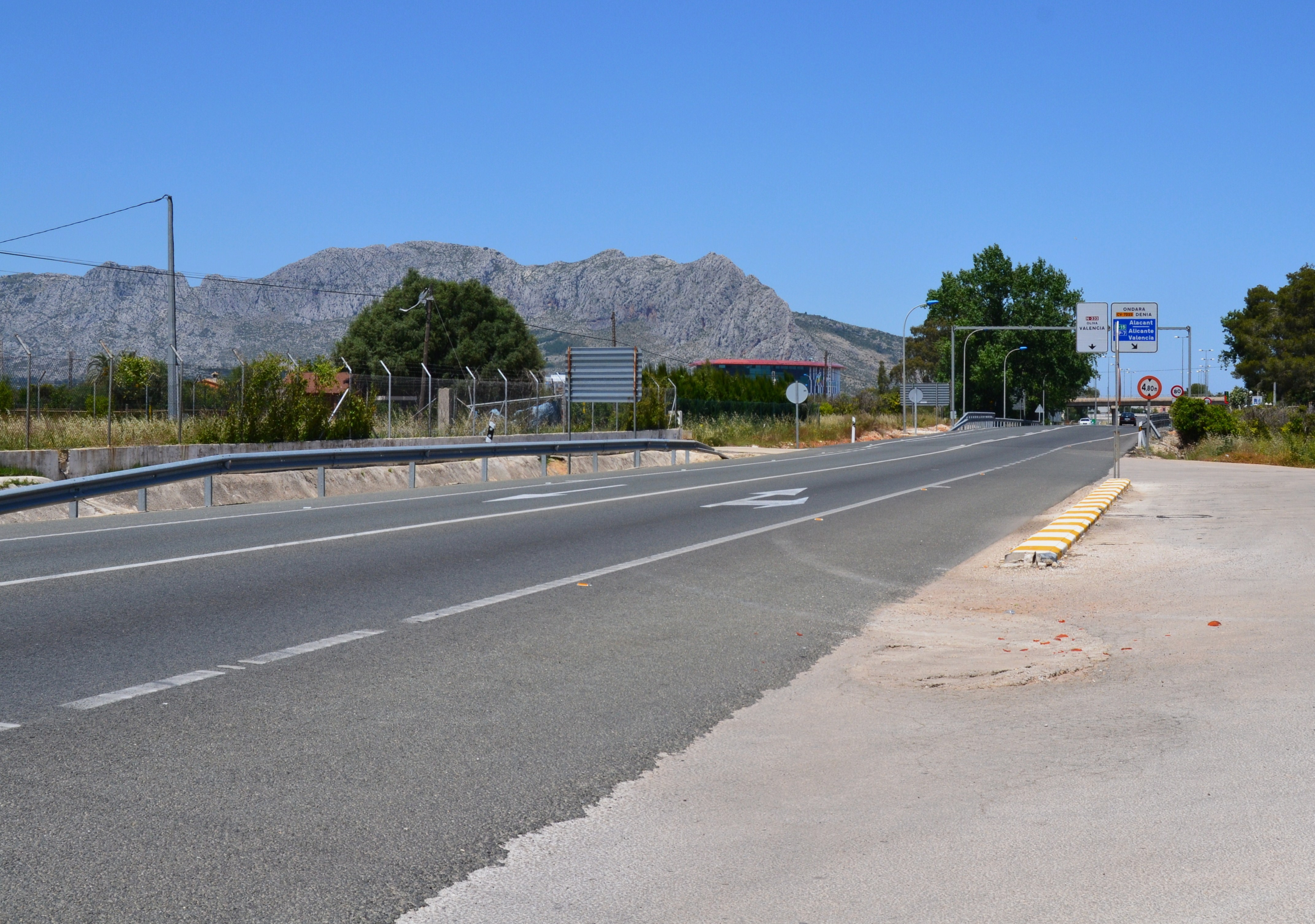 Carrertera 332 per Ondara, Marina Alta.